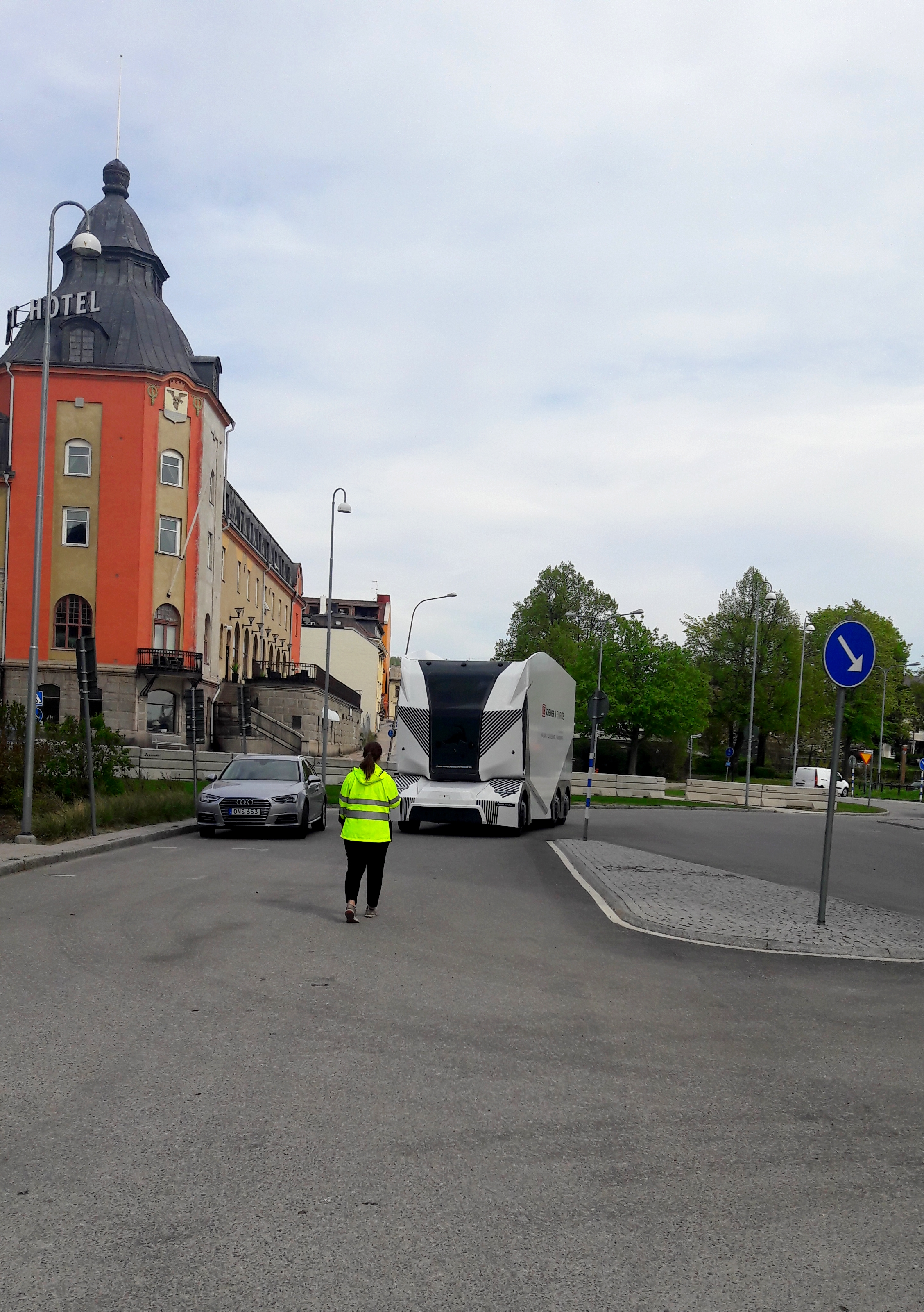 En T-pod med operatör.